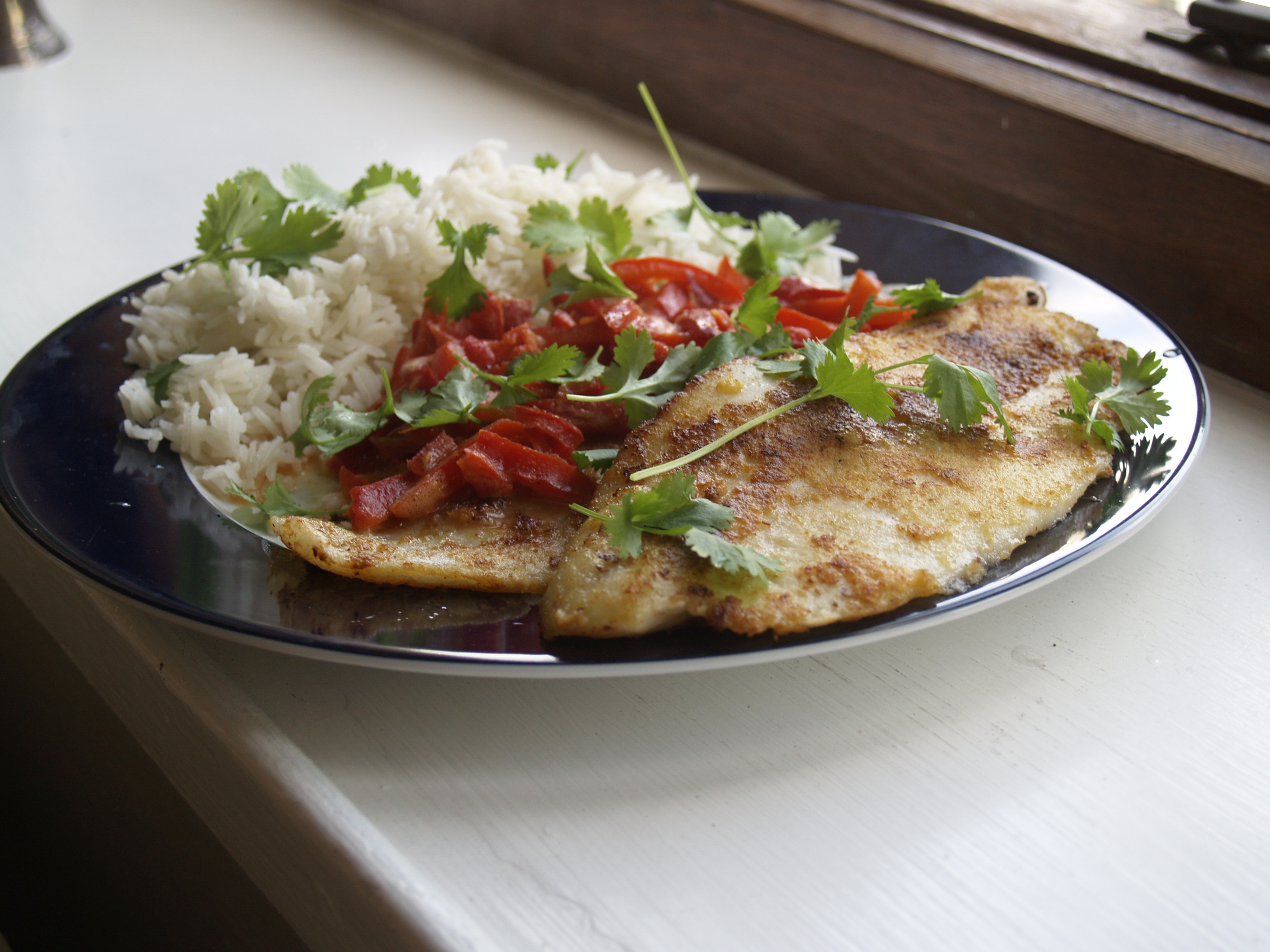 Pangasius med ris og rød peber